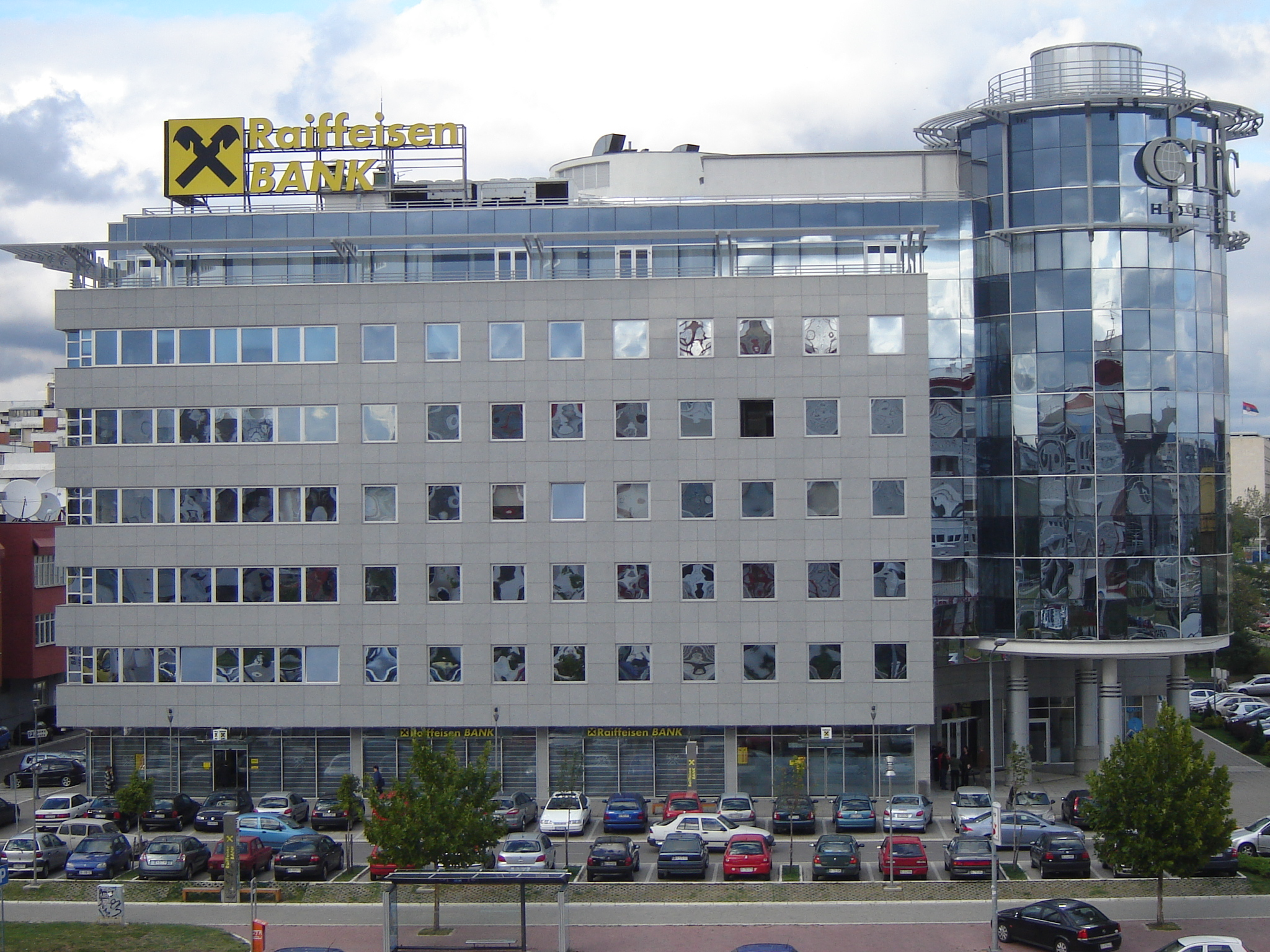 Пословница Рајфајзен Банке на Новом Београду